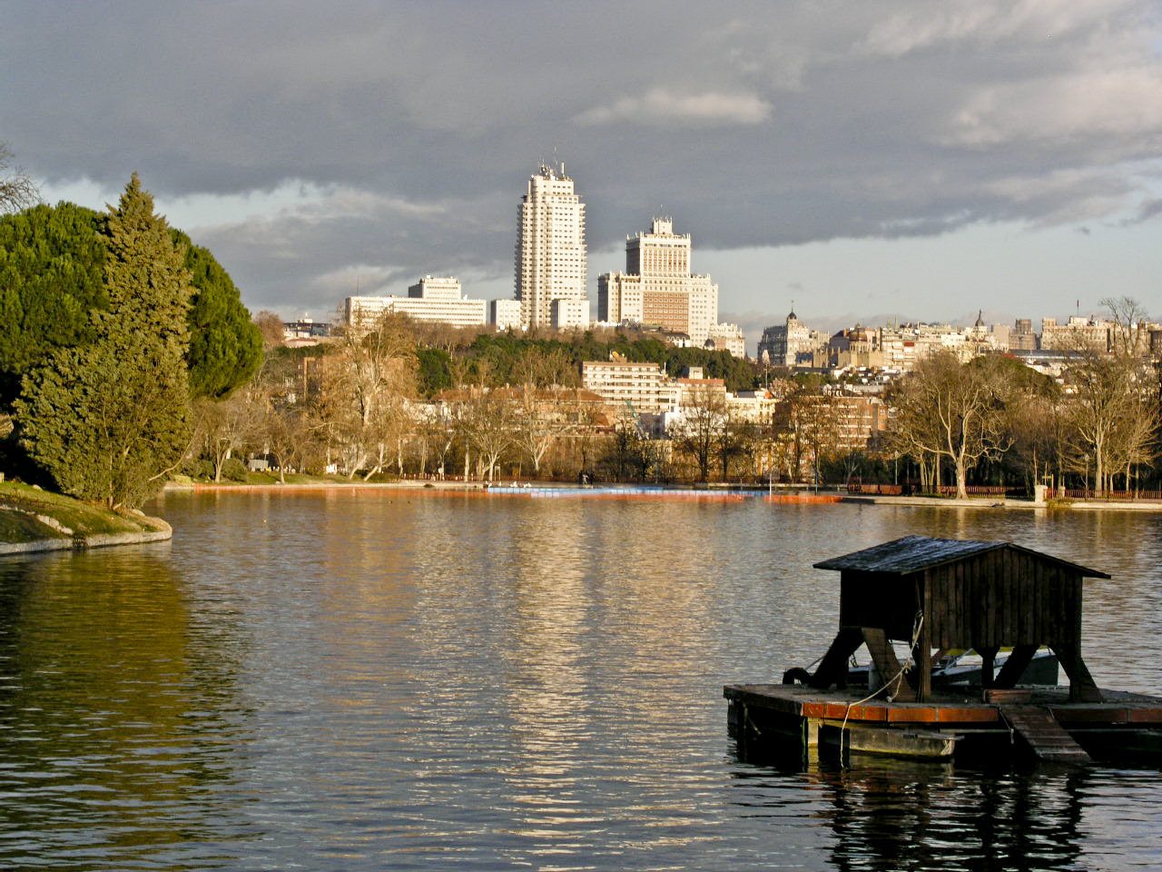 Casa de Campo, Madrid, Spain. Lake and view.